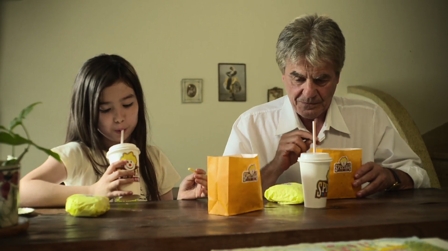 Nina El Mal Menor, unitario emitido por la TV Pública, Argentina